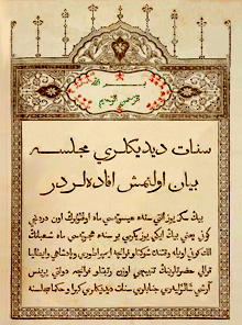 Traduction des bulletins de la grande armée Française pour l'année 1805